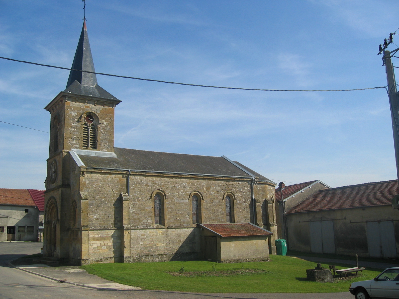 Eglise de Cunel